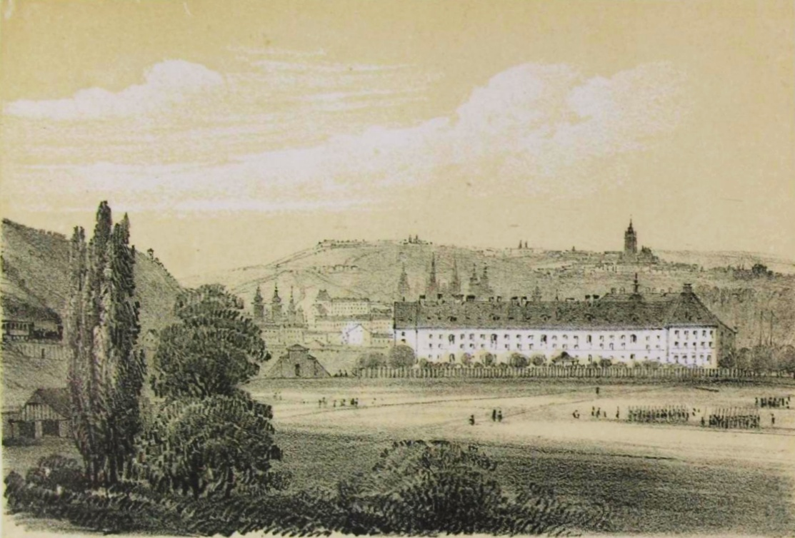 Pražská Invalidovna